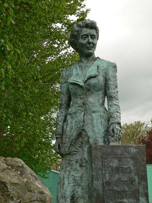 Kanturk (Ireland). La statua di Hanna Sheehy-Skeffington nel parco della città